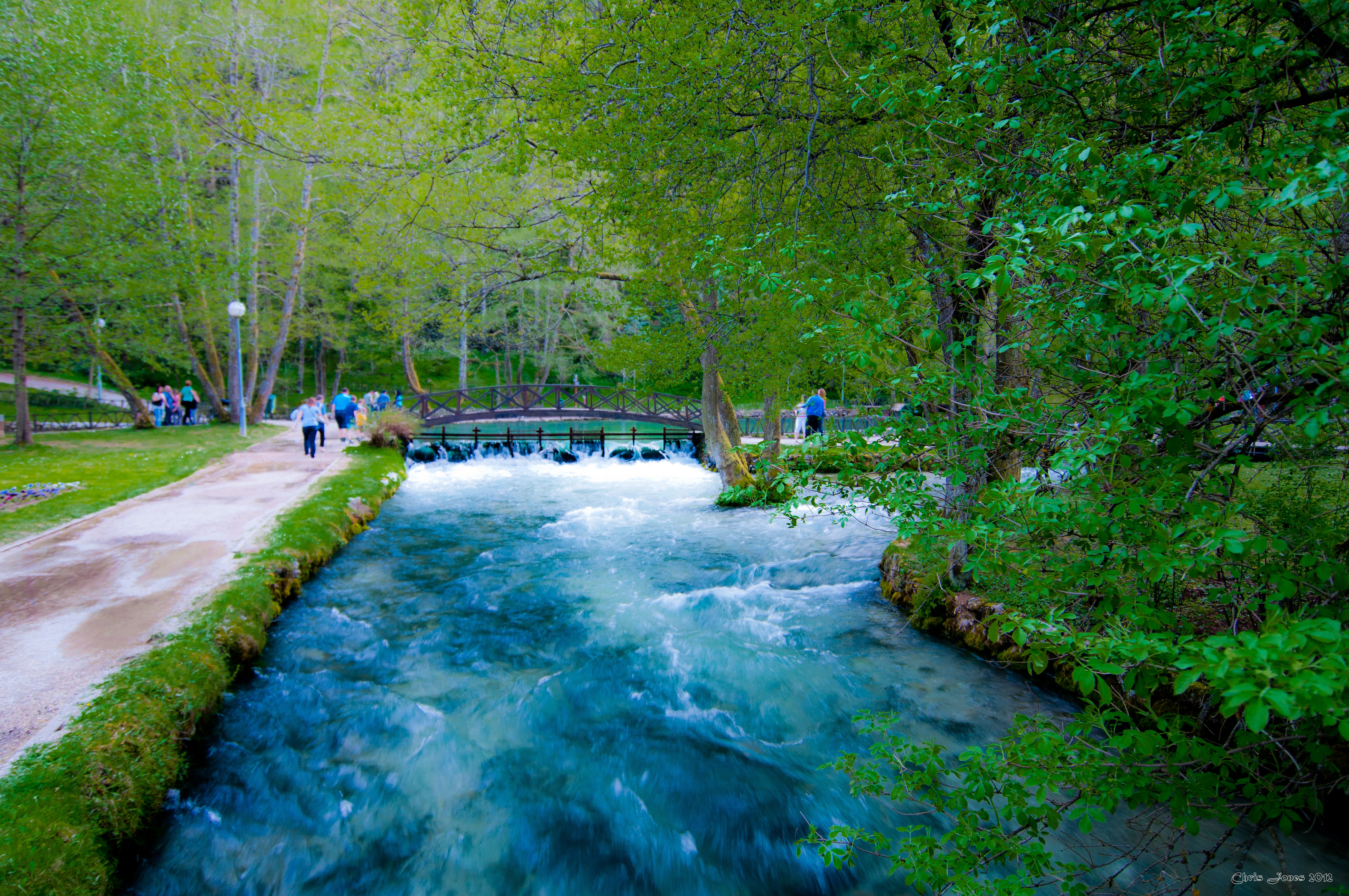 Sarajevo National Park